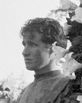 Wereldkampioenschappen wielrennen amateurs op de weg. Arnaldo Pambianco (2e)